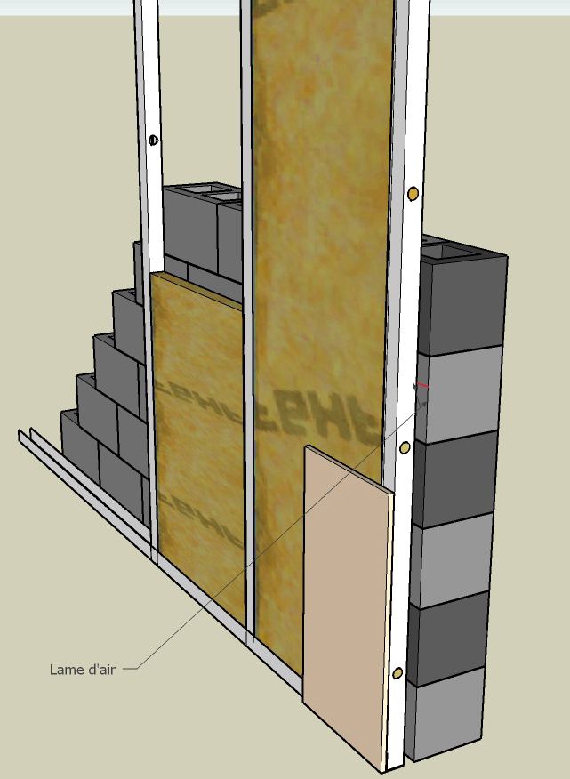 Lame d'air